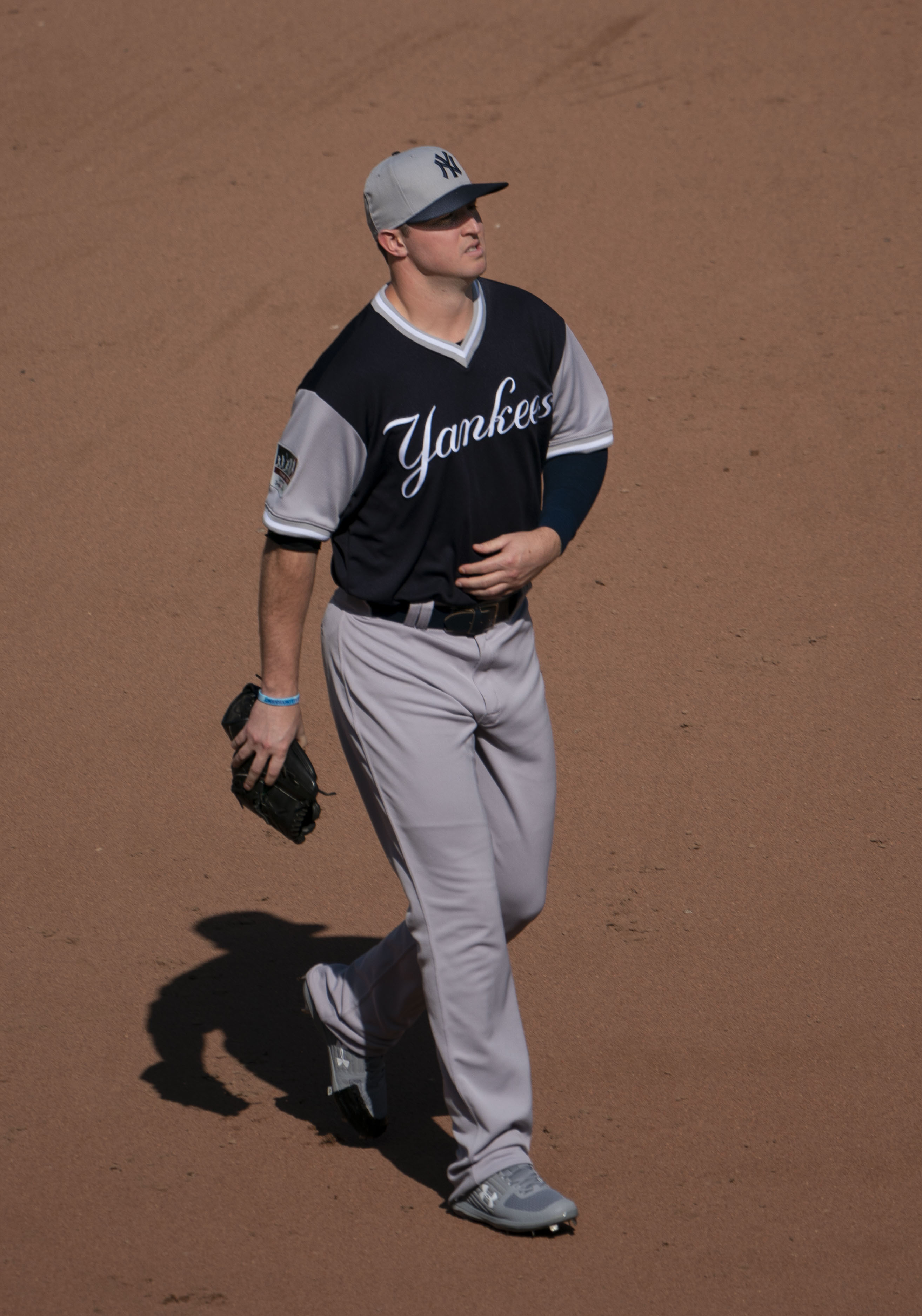 Yankees at Orioles 8/25/18